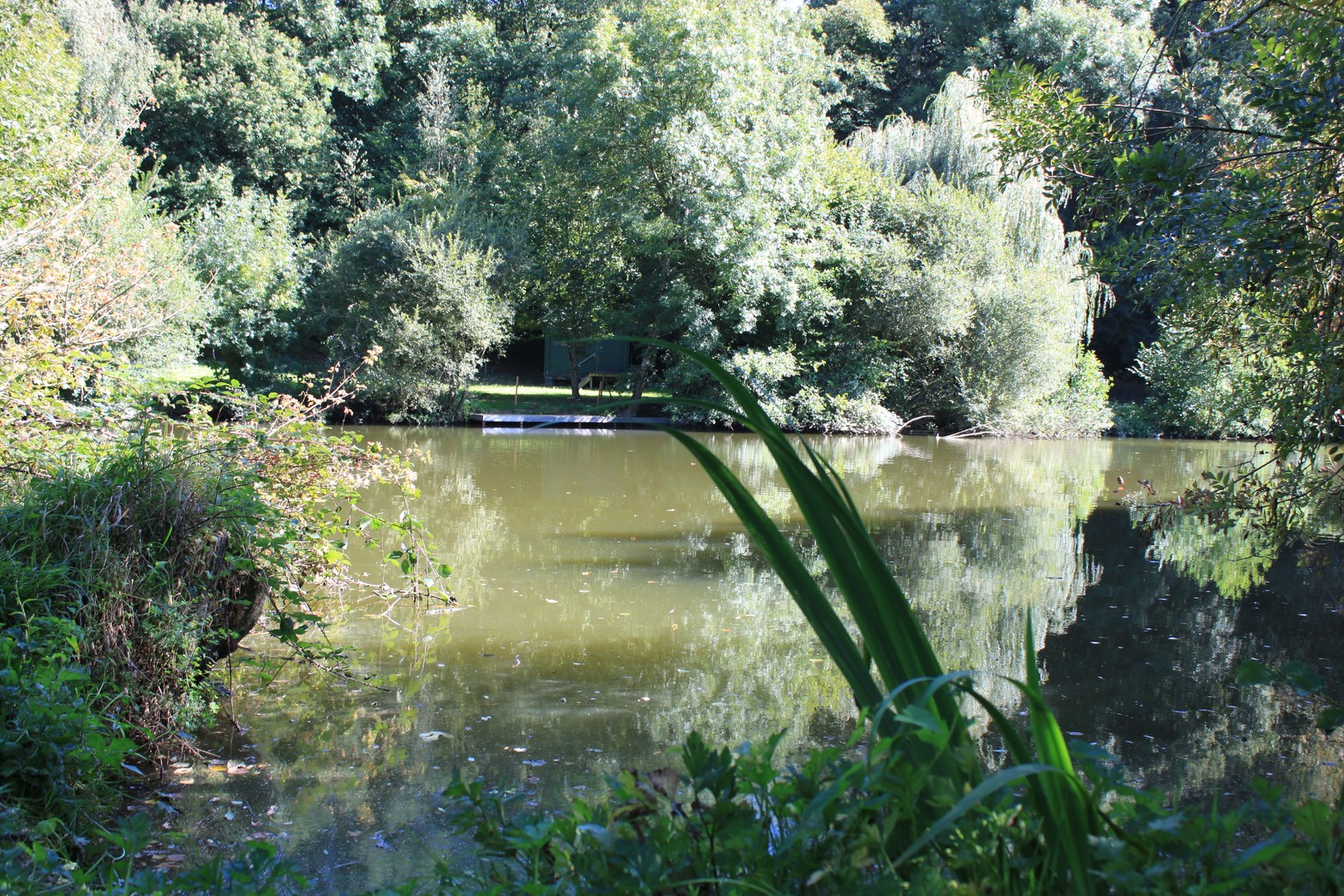 Photo prise à la Réorthe